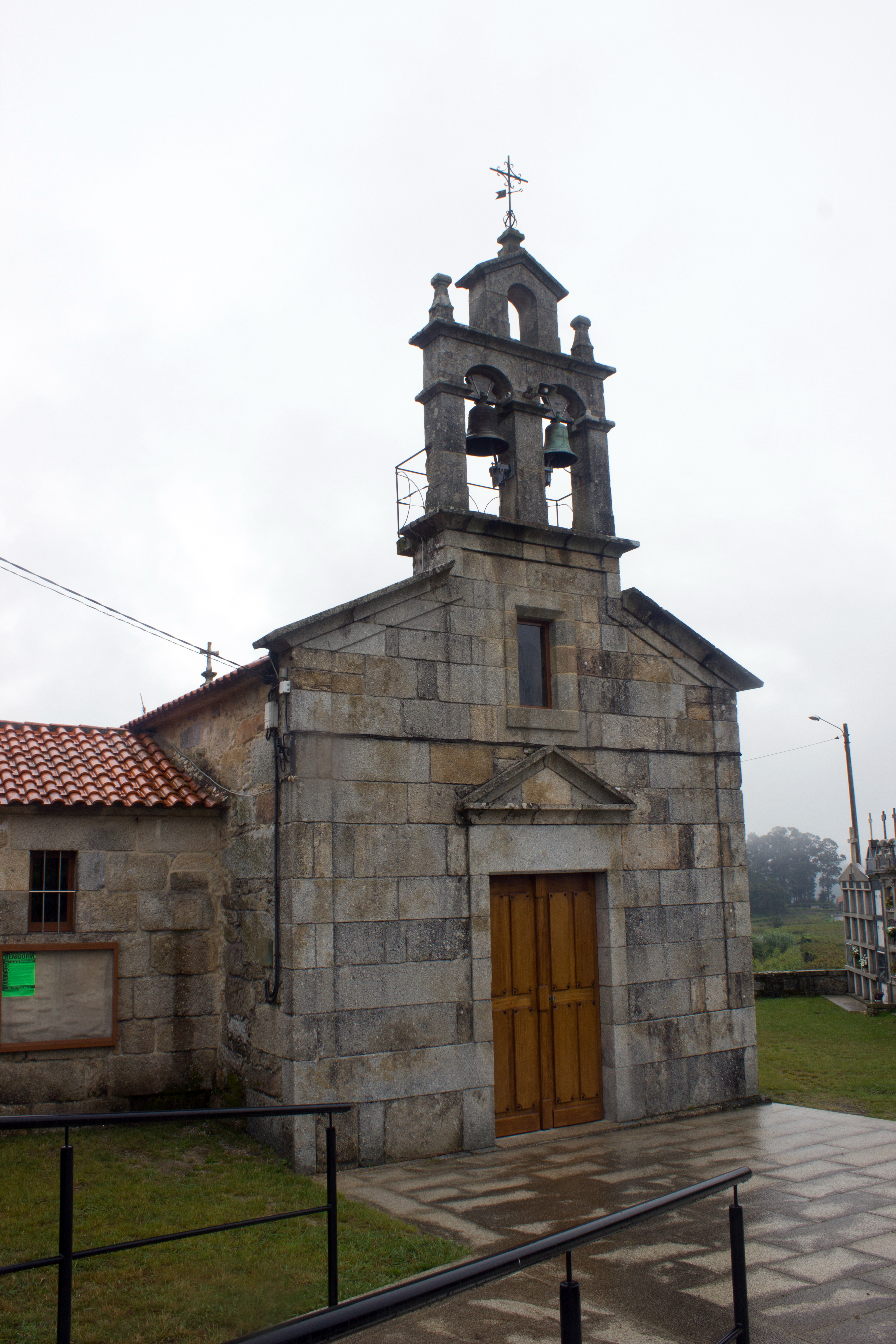 Igrexa de San Fins de Solobeira, no concello de Vilagarcía de Arousa.